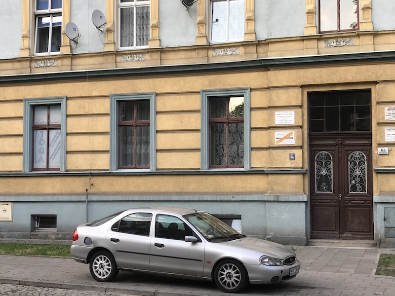 Kamienica przy ul. Wojska Polskiego 6-6a w Raciborzu